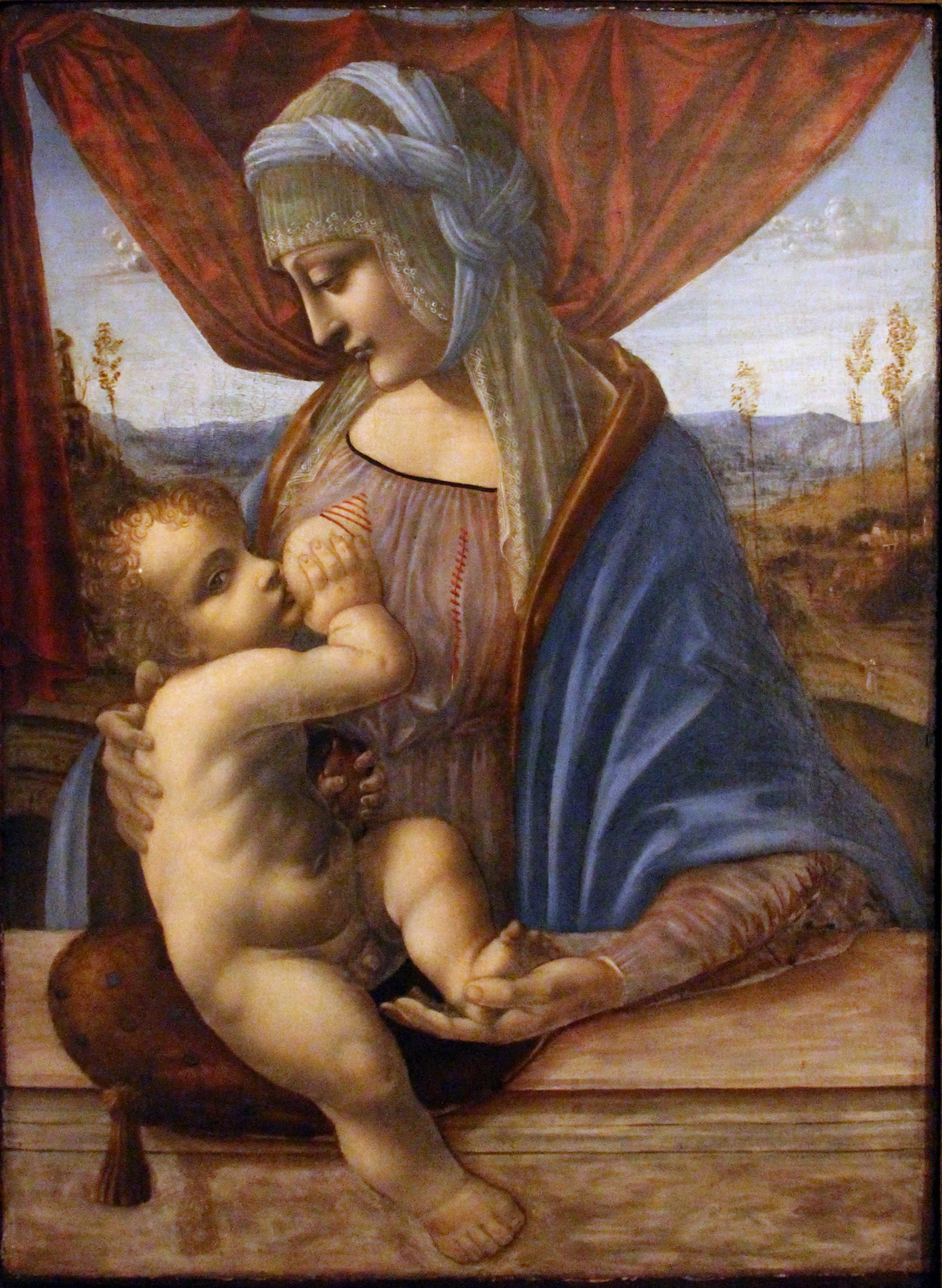 Museo Poldi Pezzoli (Milano)